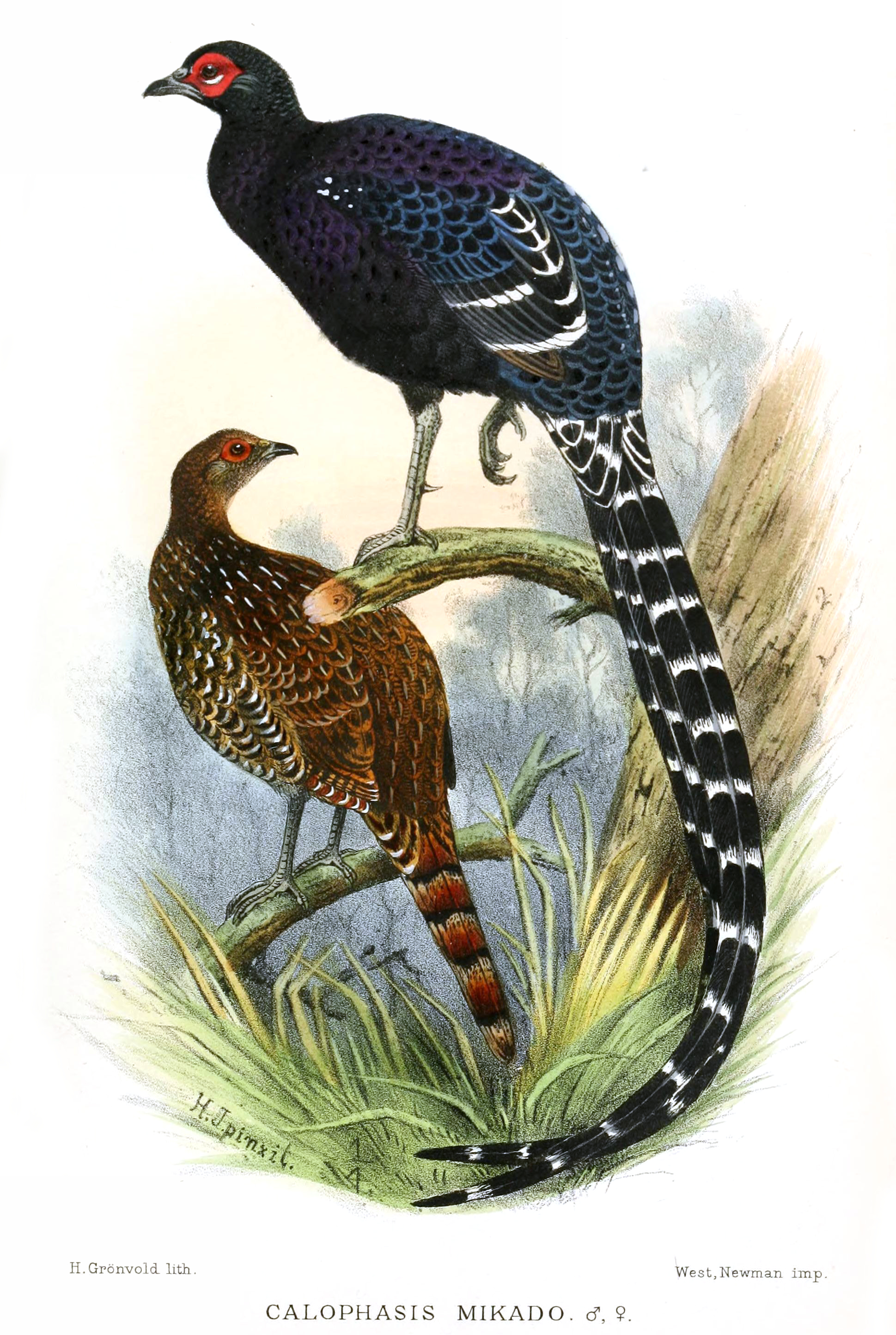 Calophasis mikado = Syrmaticus mikado